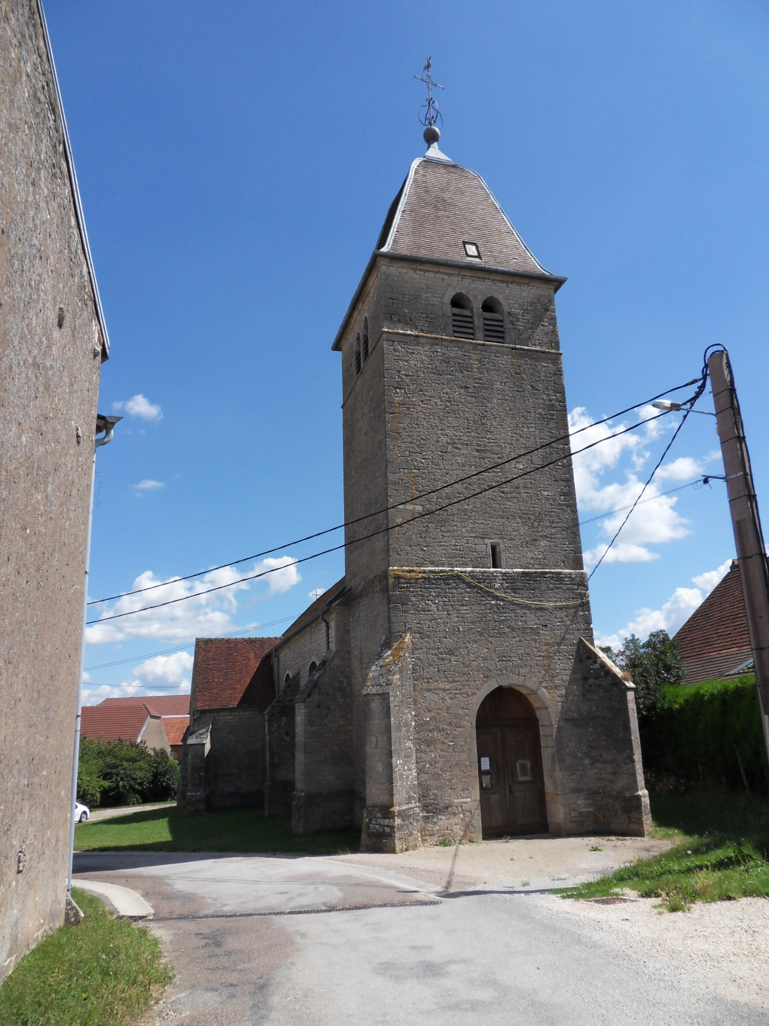 L'église de Chaumercenne, Franche-Comté France.